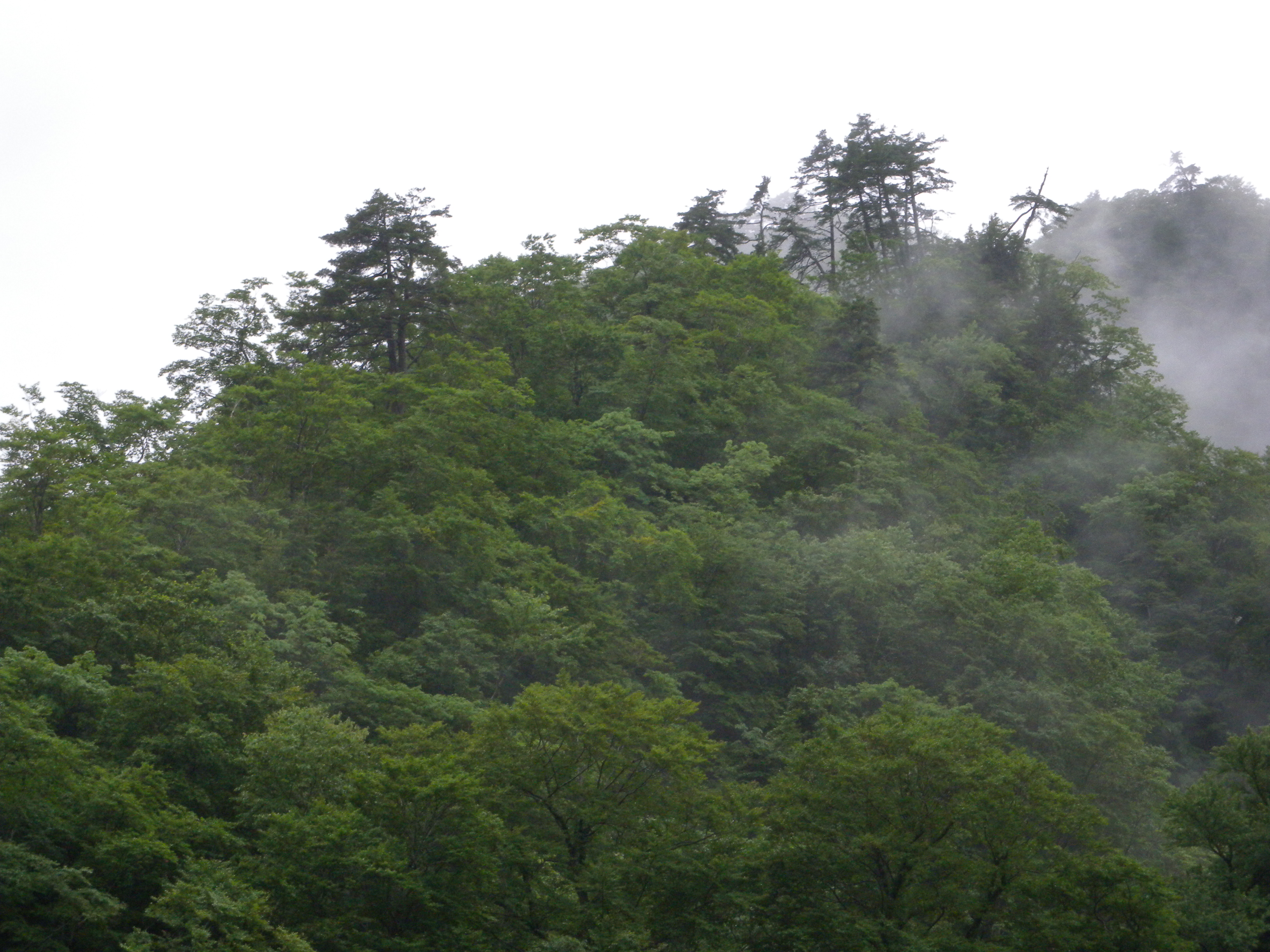 北海道檜山郡厚沢部町に所在する天然記念物「鶉川ゴヨウマツ自生北限地帯」